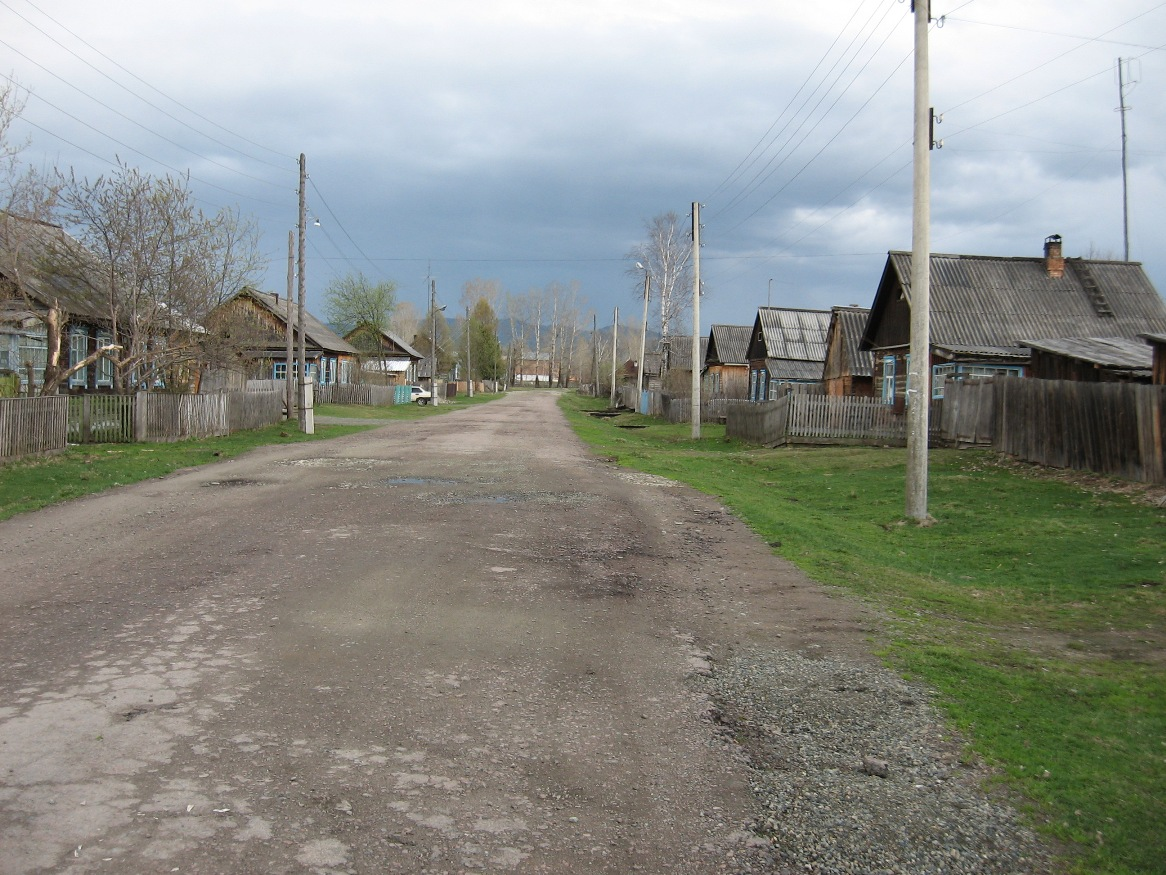 Посёлок Танзыбей (Красноярский край, Ермаковский р-н): улица Мира.